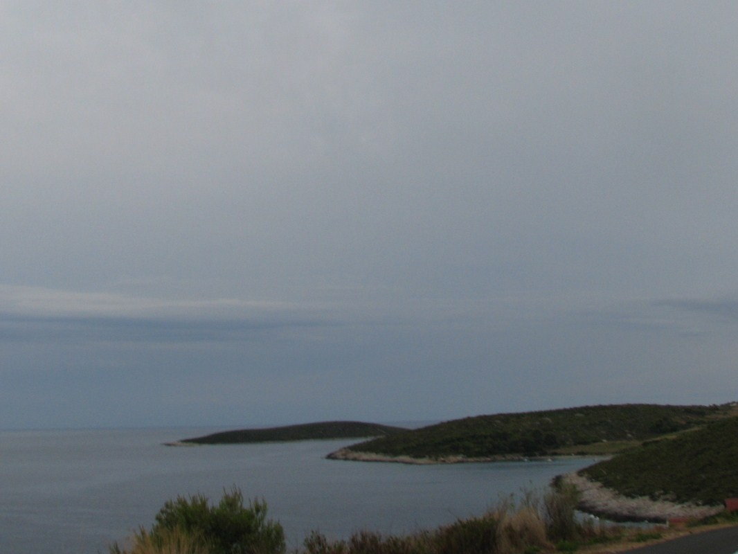 Otočić Ravnik, pogled s Visa